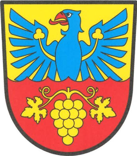 Krhovice znak